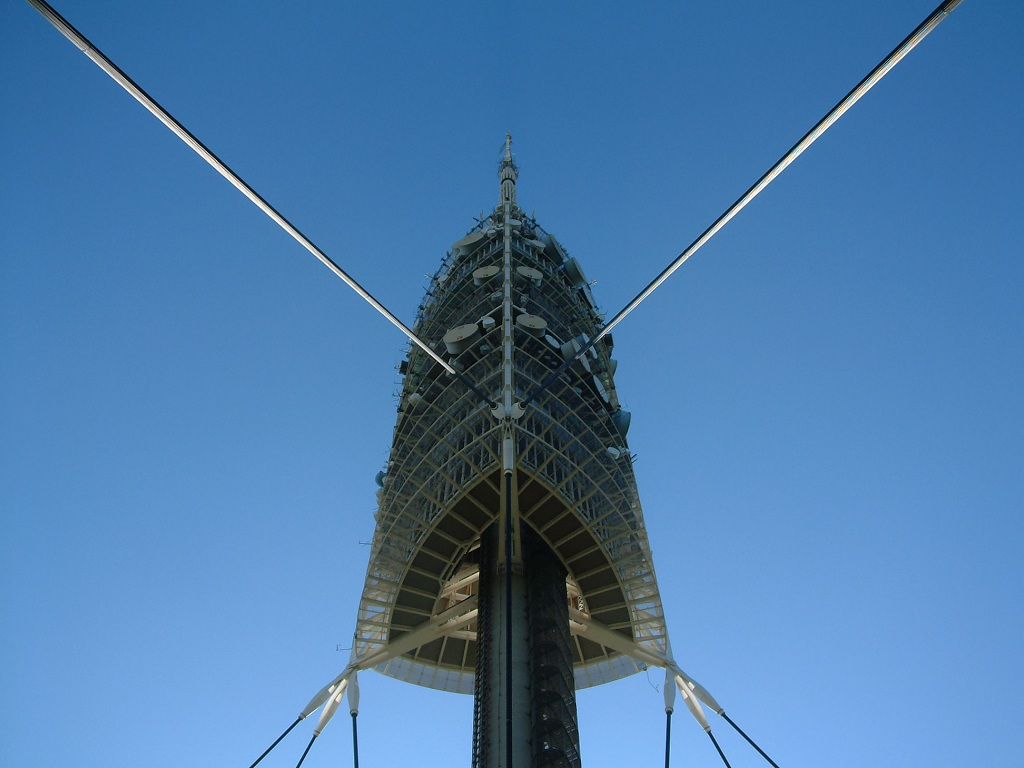 Descripción: Torre de telecomunicaciones de Collserola (Vista inferior) Fecha: 08/12/2001 Hora: 12:03 Cámara: FinePix 6900Z ISO: 100 Tv: 1/830 Av: 4.5 Autor: aTarom